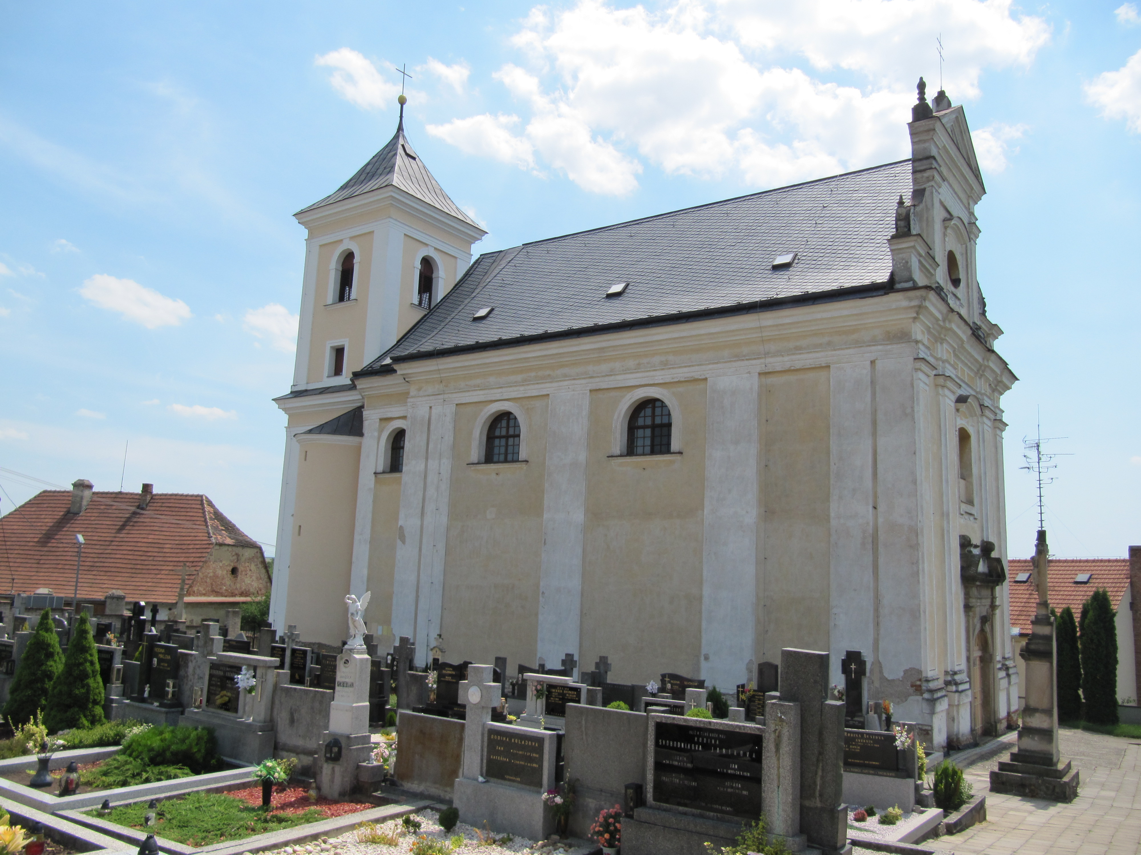 Kostel Obrácení sv. Pavla (Syrovín), Syrovín